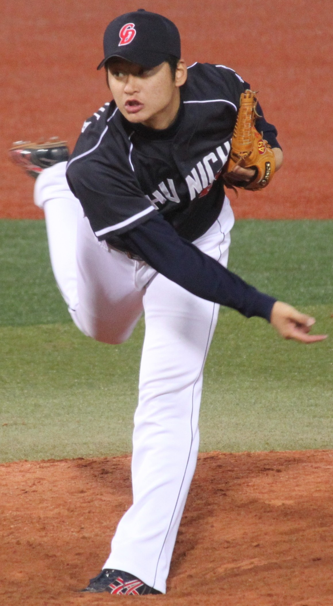 中日ドラゴンズ投手の井上公志。横浜スタジアムにて。